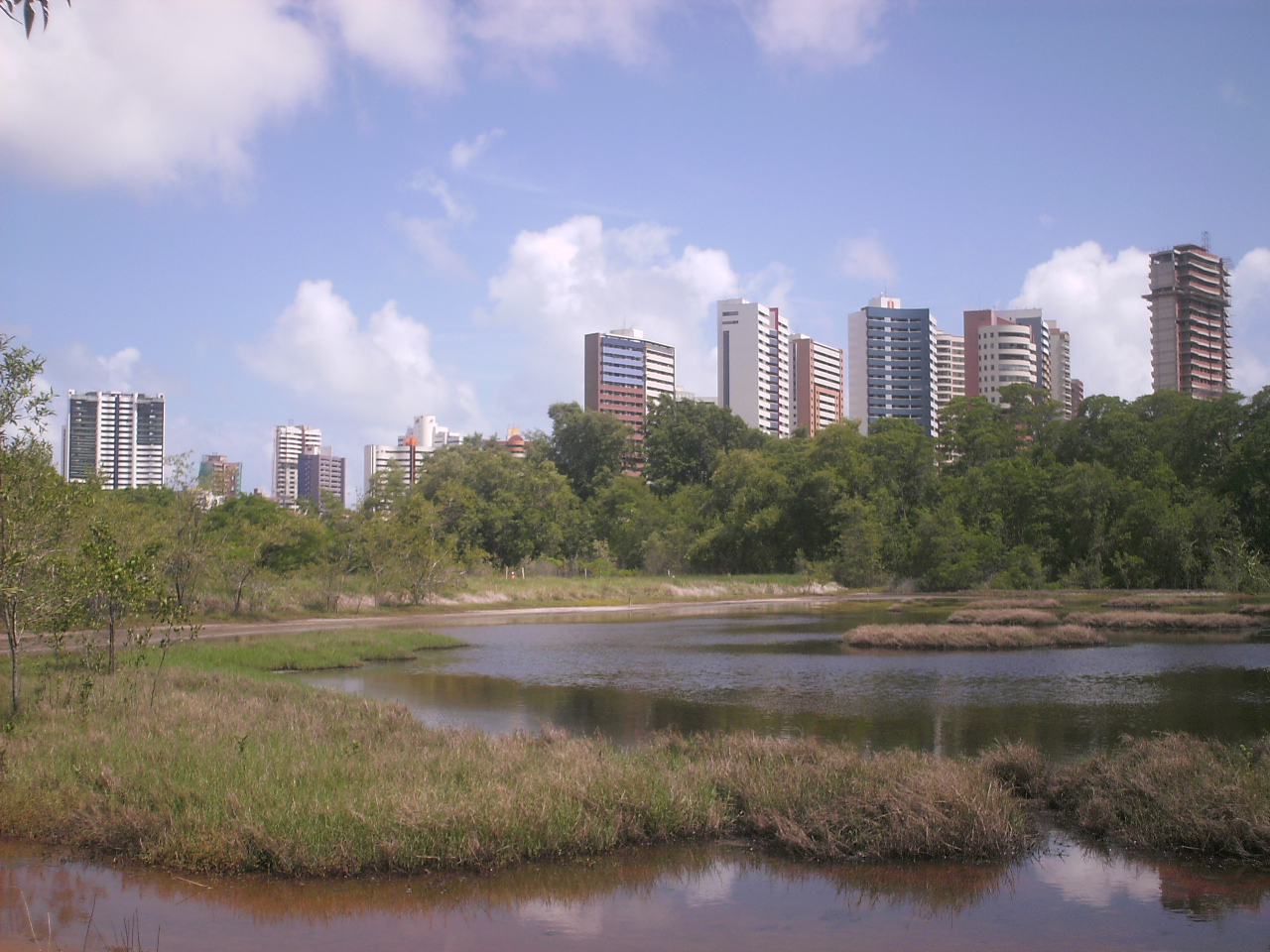 Bairro do Cocó visto de dentro do Parque do rio Cocó. Fortaleza, Ceará, Brasil.